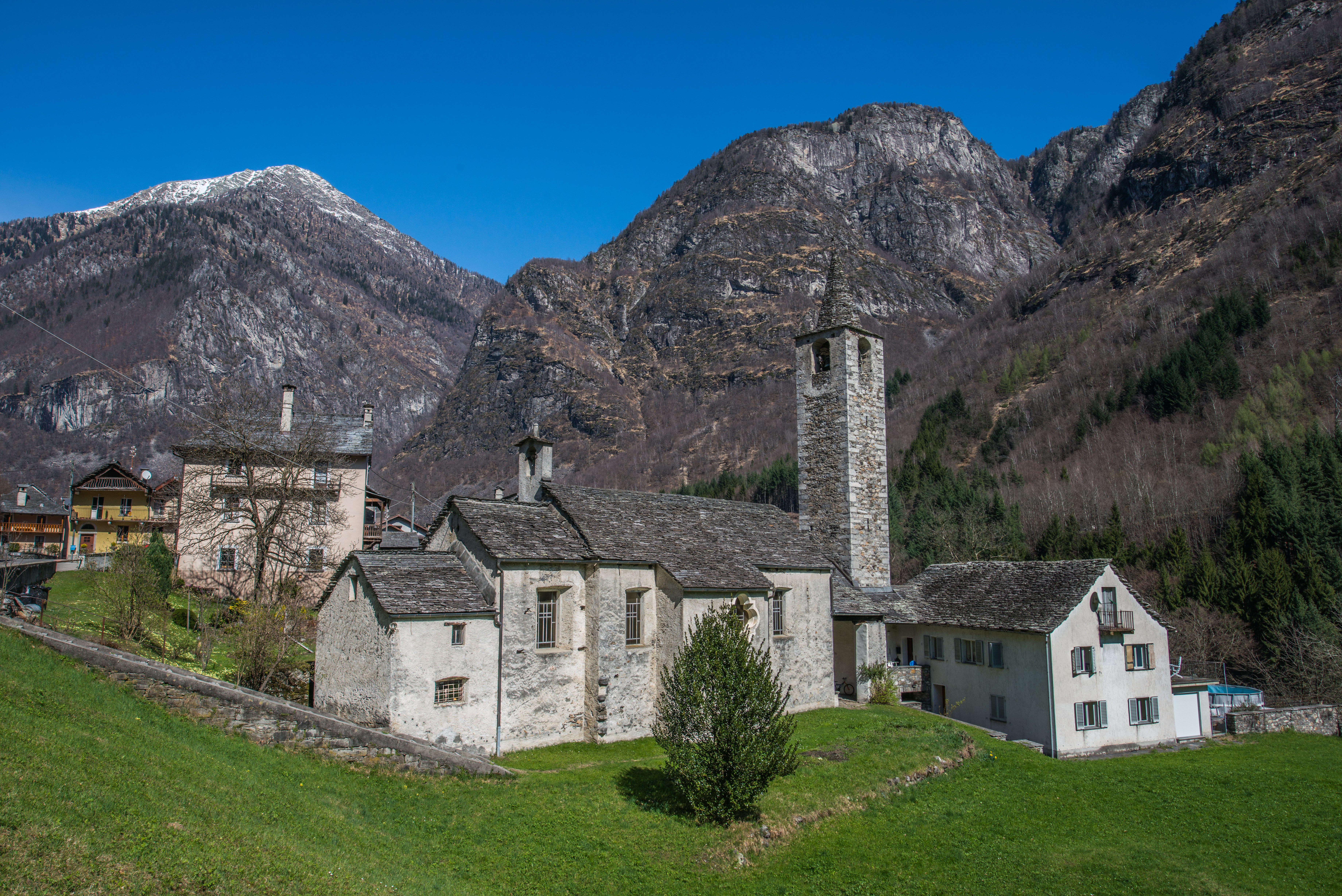 Chiesa di S.Maria di Loreto in Broglio TI.